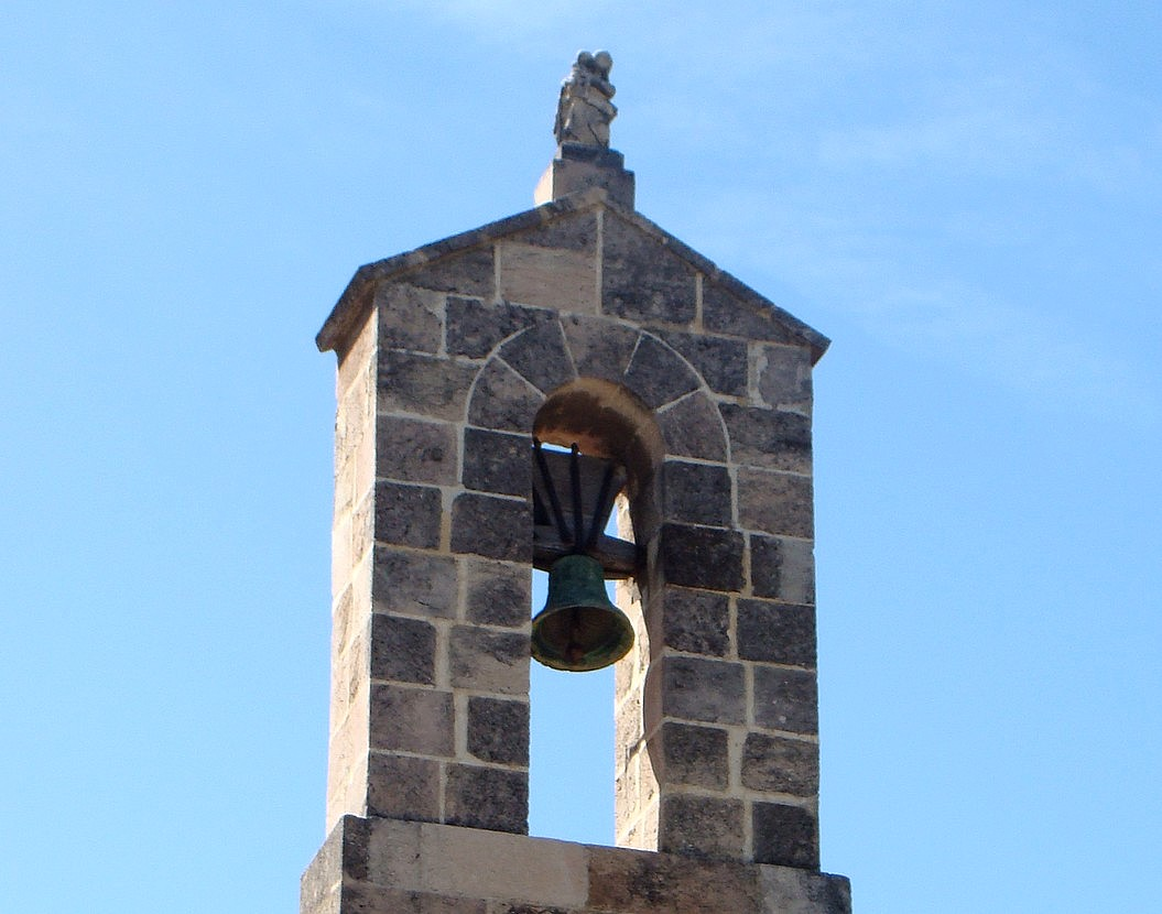 Le clocheton de la chapelle N.D. de la Galline, surmonté d'une petite statue de la Vierge.